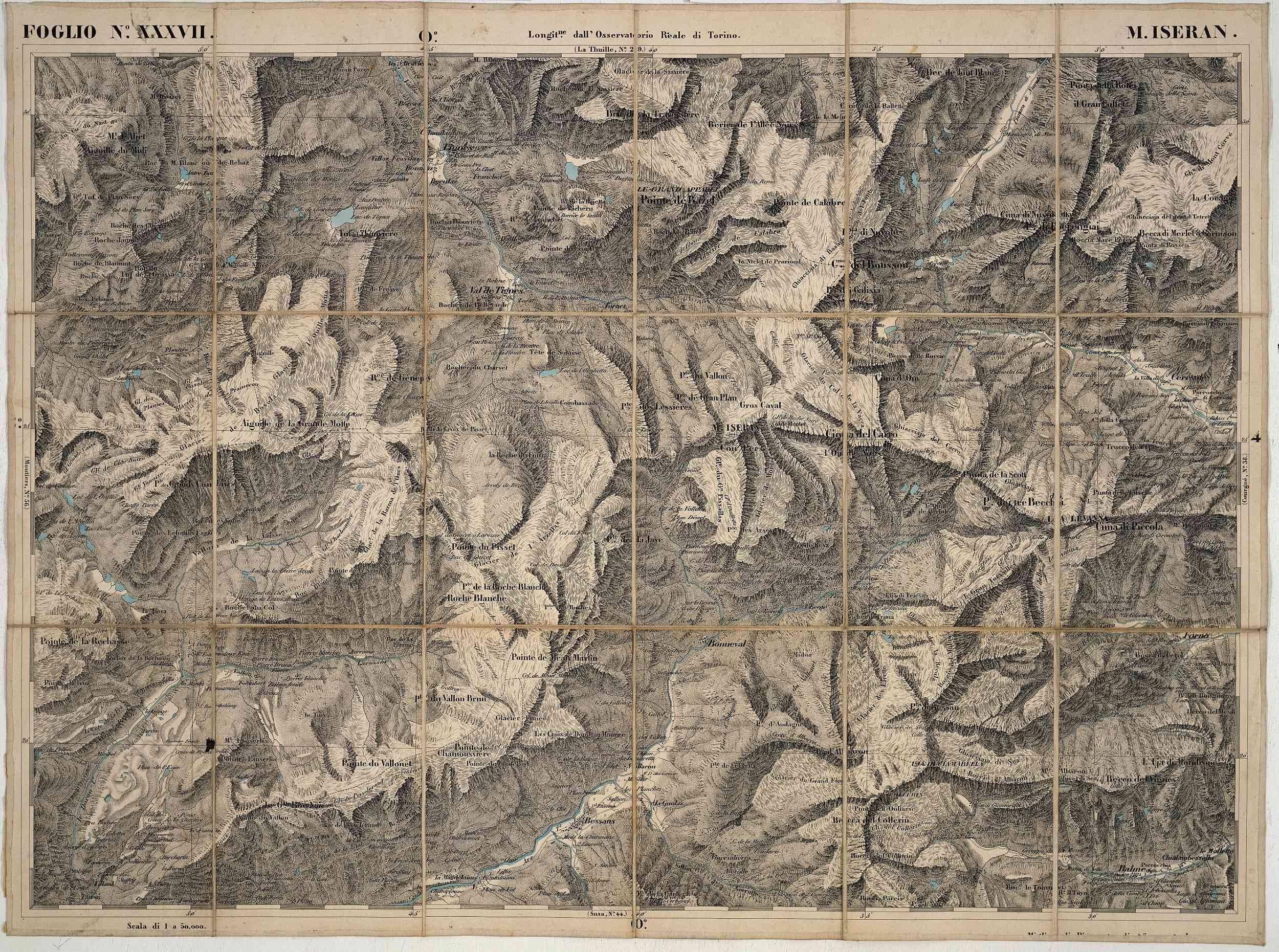 Carta topografica degli stati in terraferma di S.M. il Re di Sardegna / opera del Corpo reale dello Stato Maggiore. Foglio 37, Mont Iseran. aussi appelé ""Carte de l'Etat-Major sarde" au 1:50000 avec le mythique montIseran